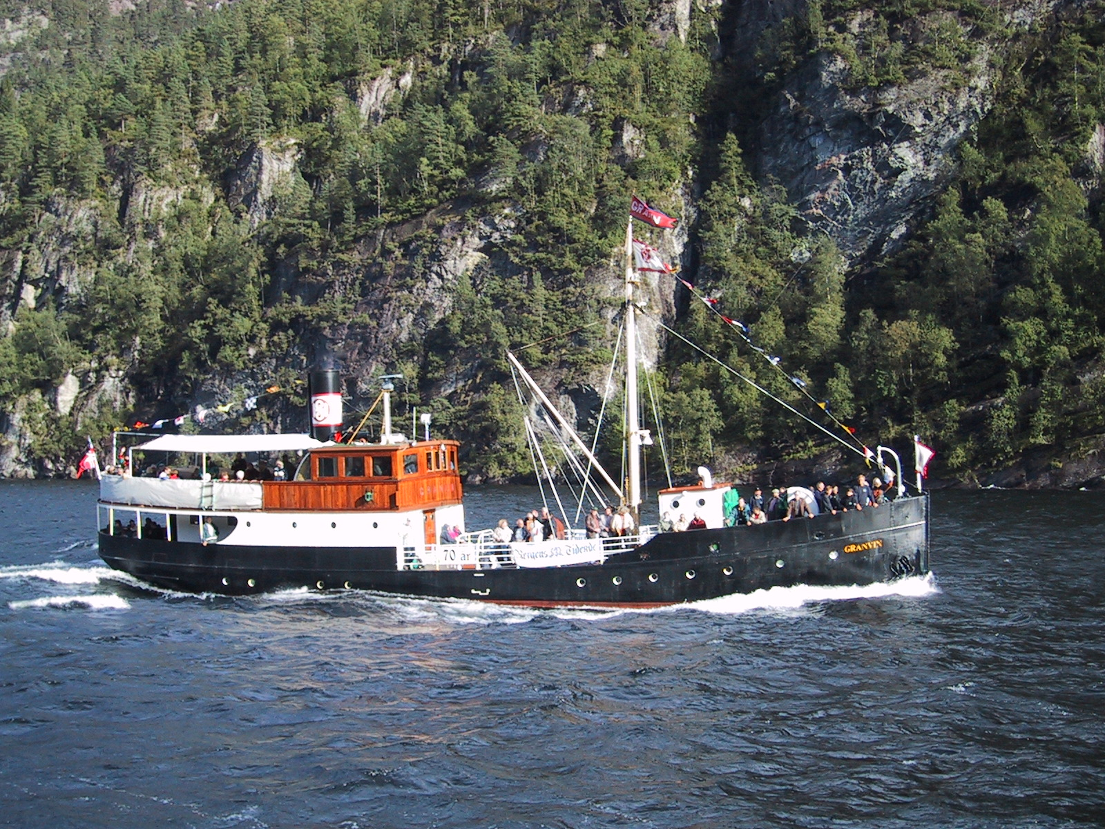 MS «Granvin».